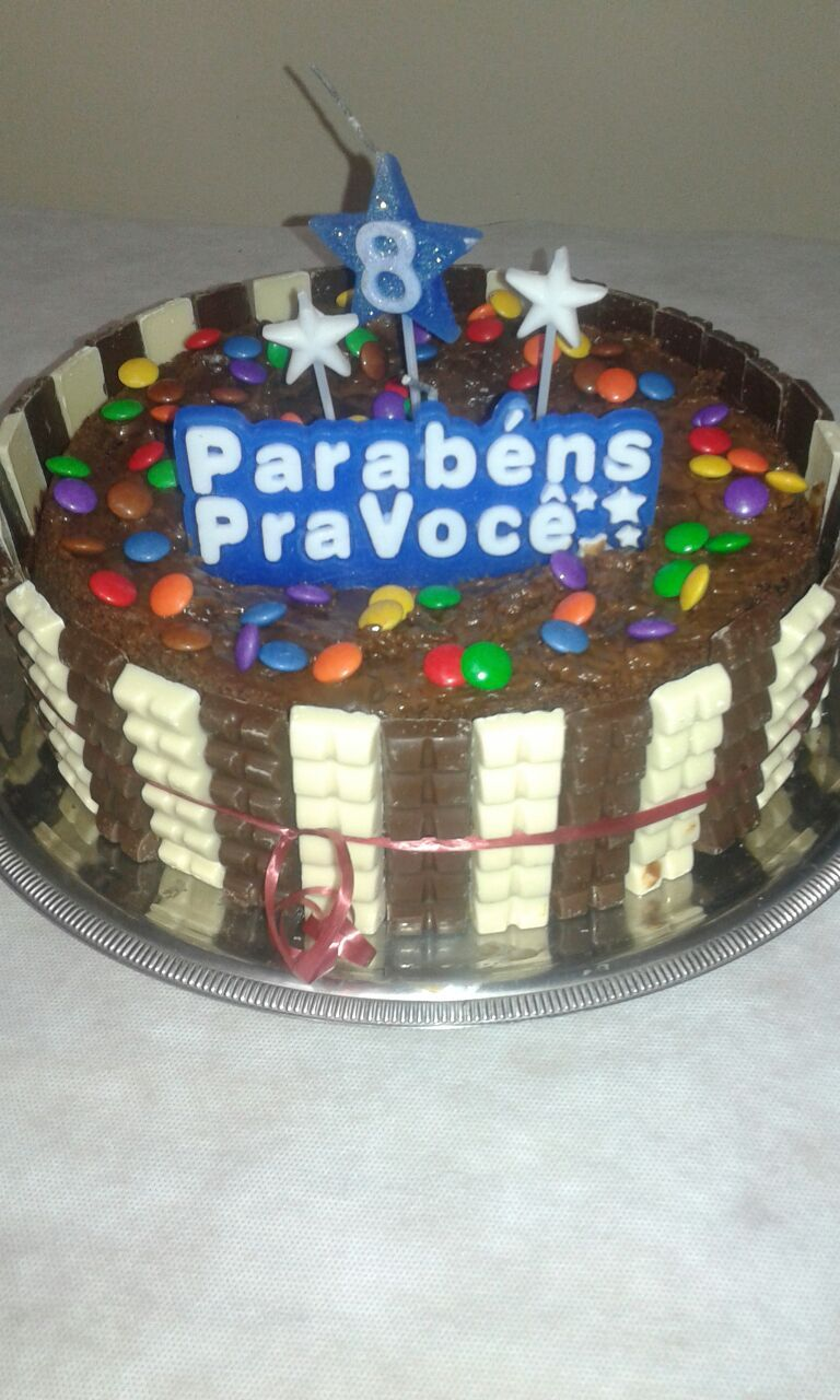 Bolo aniversário oito anos